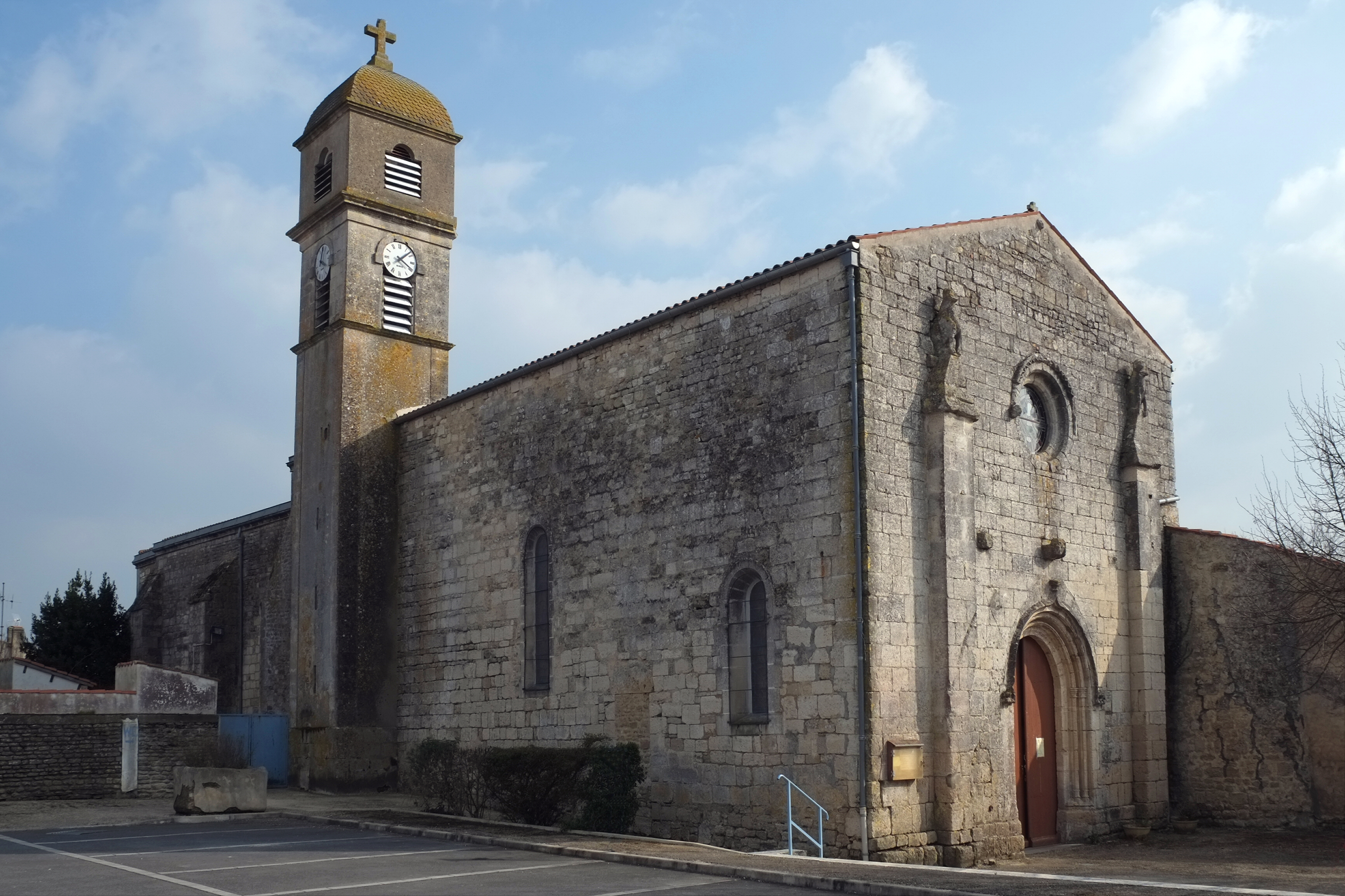 Église Saint-Xiste Muron Charente-Maritime France